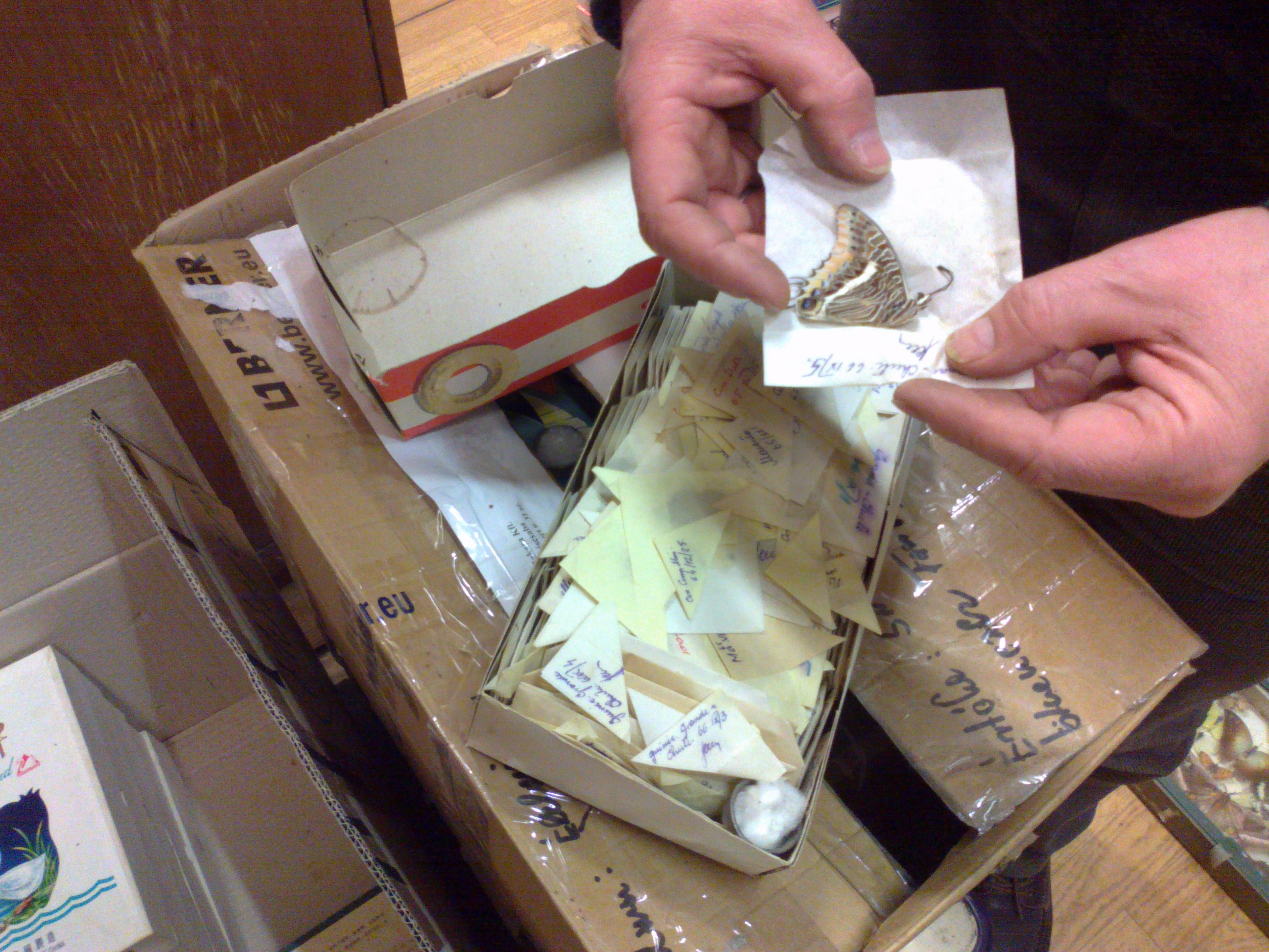 Ferencz Károly lepkéi